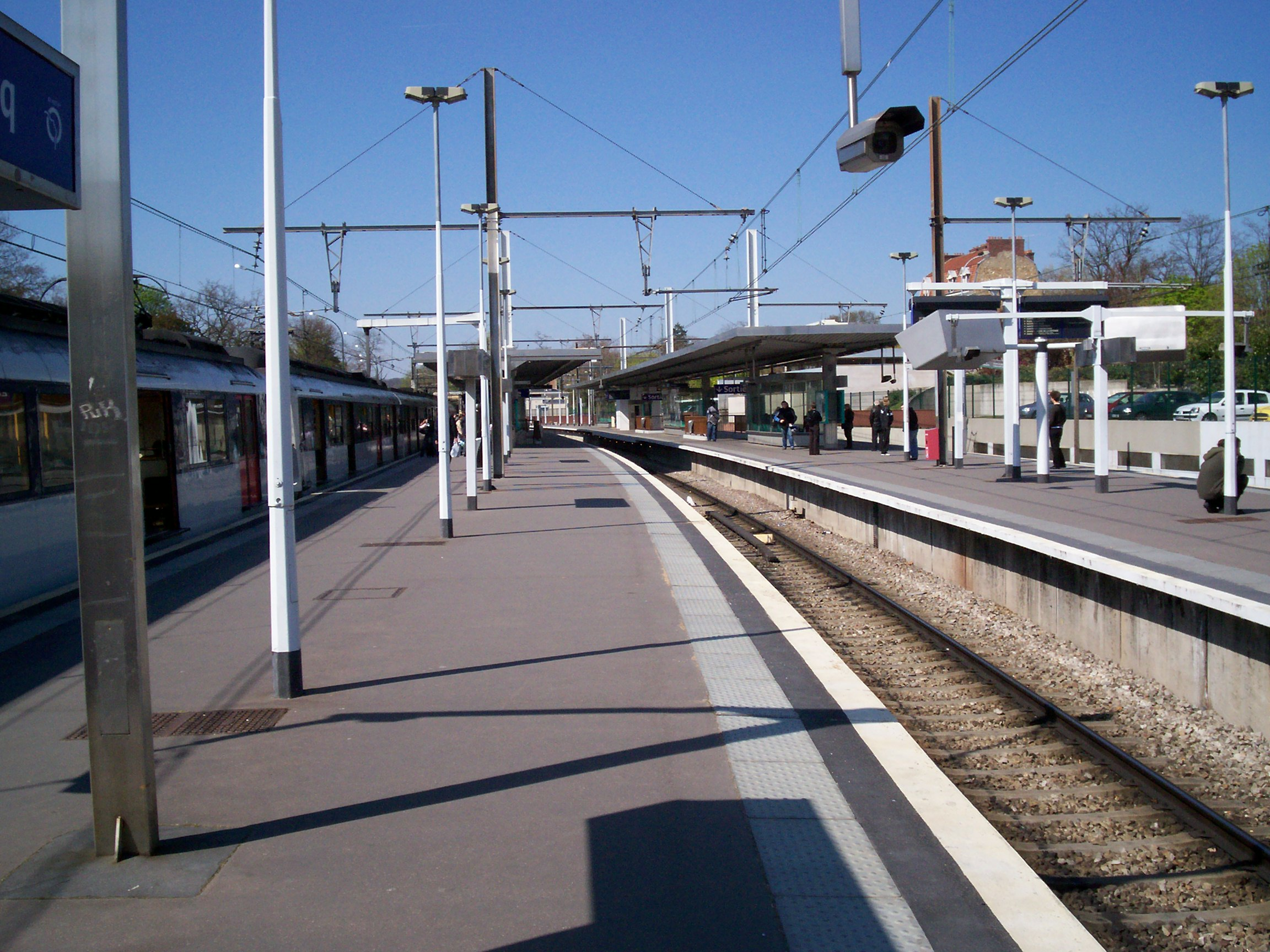 Vue des 2 quais de la gare du Vésinet - Le Pecq